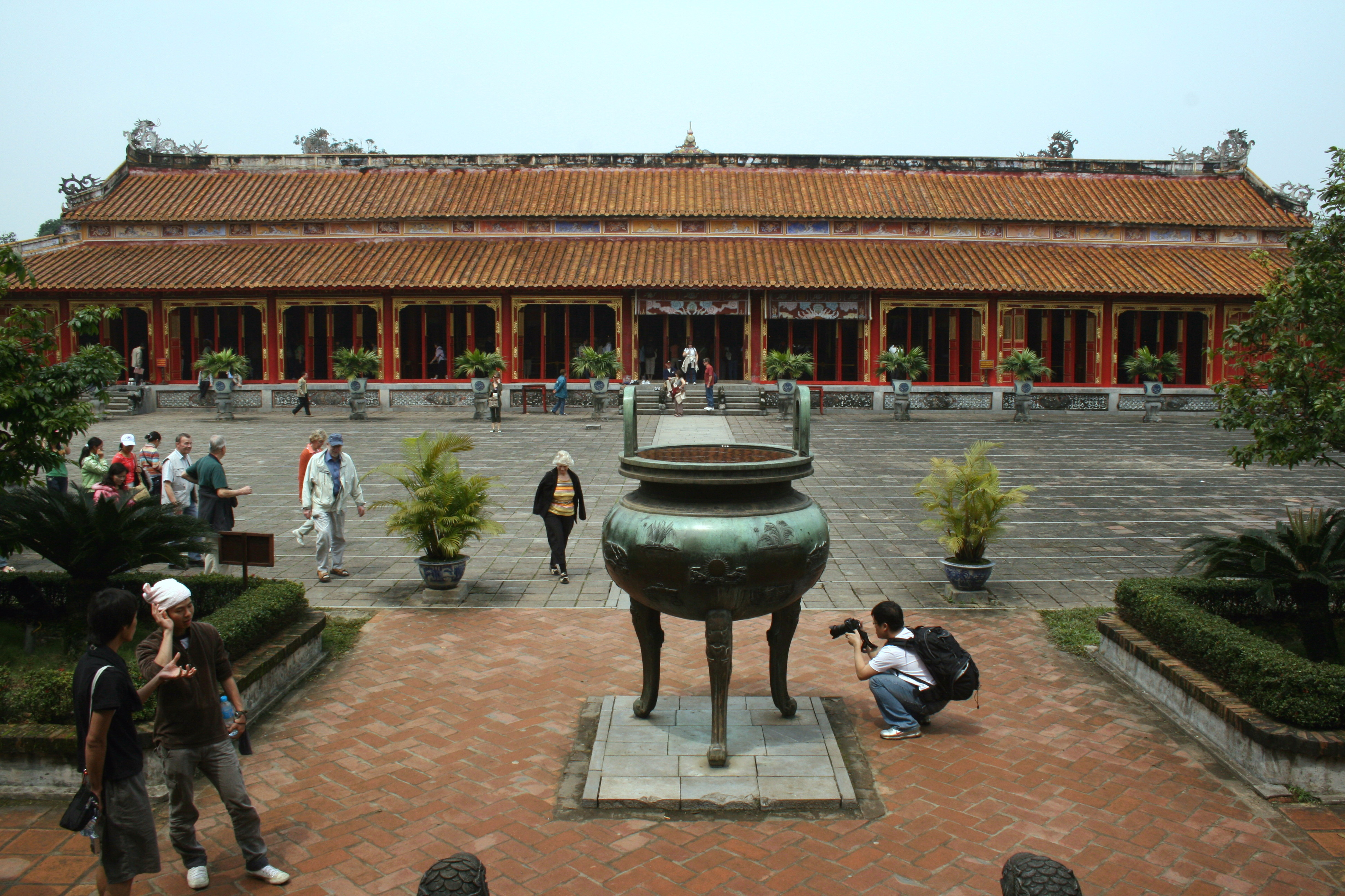 Thế Miếu taị Hue